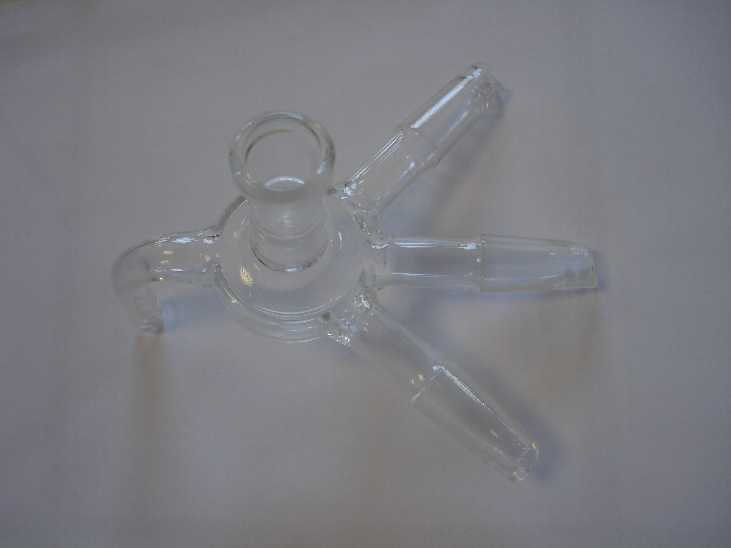 Алонж "паук" (разновидность), алонж Бернауэра